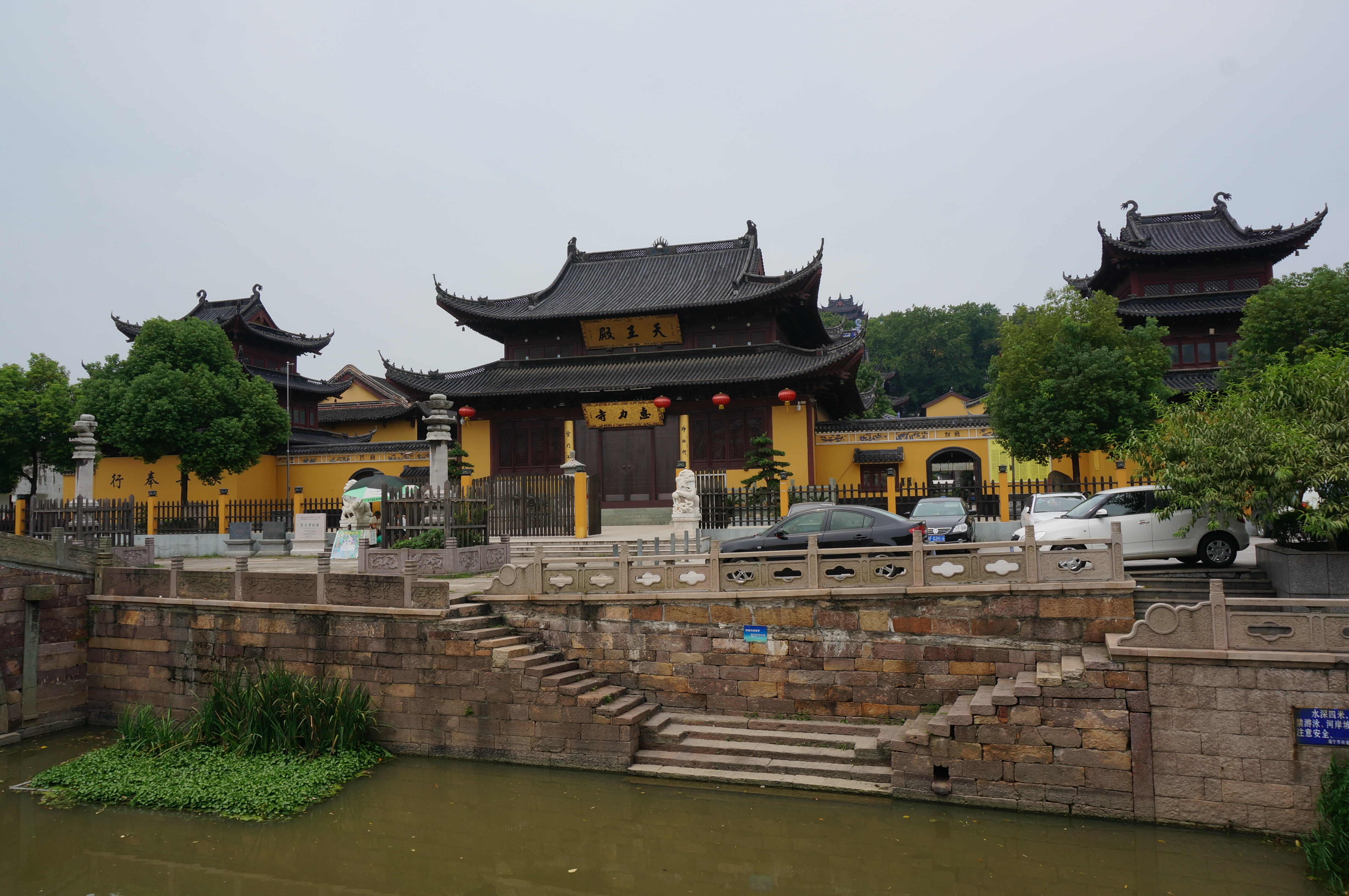 惠力寺，经幢、天王殿及钟鼓楼。